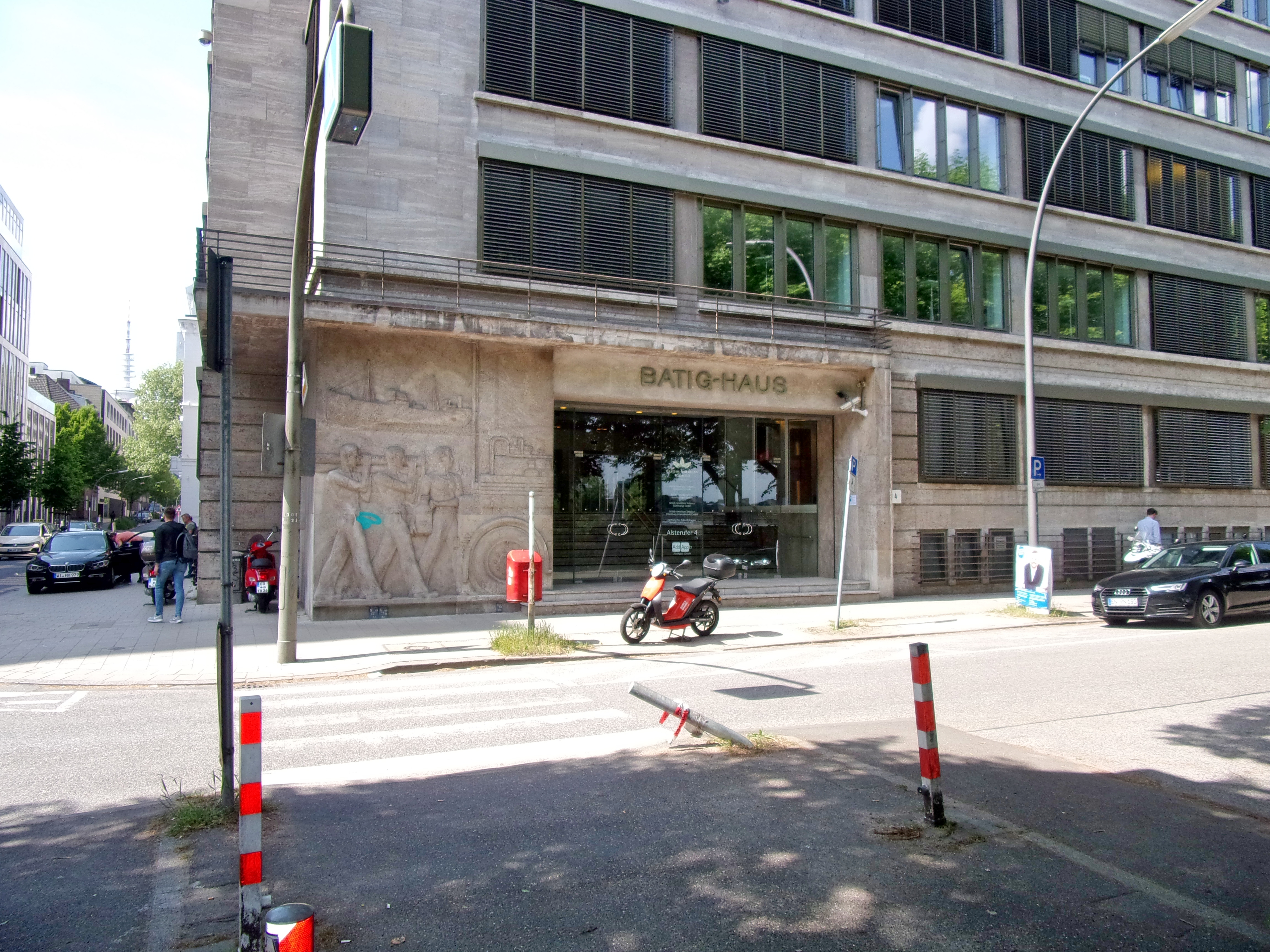 Alsterufer 4-5, Hamburg-Rotherbaum, eingetragen als Verwaltungsgebäude. Erbaut zwischen 1929-1931, Architekt Rudolf Brüning. Links am Haupteingang des ehemaligen Shell-Hauses befindet sich ein Relief von Johannes Knubel aus dem Jahr 1931. ( Quelle: Architekturführer Hamburg, Ralf Lange ). Es dokumentiert die Herstellung, die Lagerung und den Transport von Mineralöl. Heute befindet sich in dem Gebäude die BAT-Zentrale Hamburg, British American Tobacco und das Gebäude ist nun in Batig-Haus umbenannt. This is a photograph of an architectural monument.